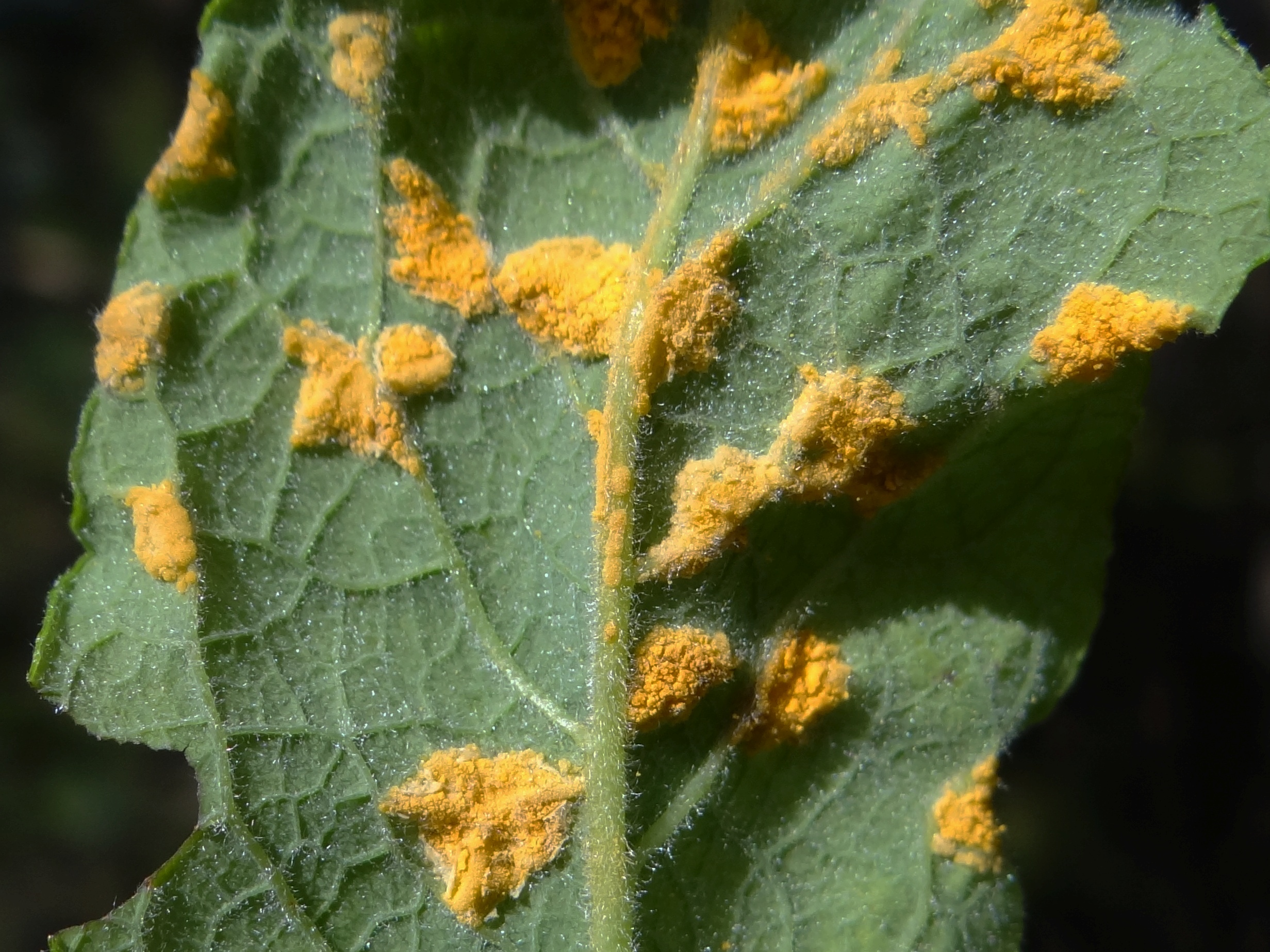 Melampsora caprearum - uredinium on leaf Salix caprea (location: Poland)